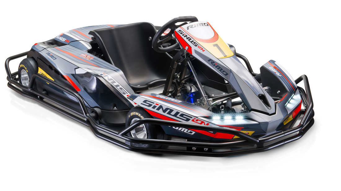 RiMO GERMANY ; Elektro Kart ; SiNUS iON aus 2014. Wetere lizenzfreie Bilder der Karts unter